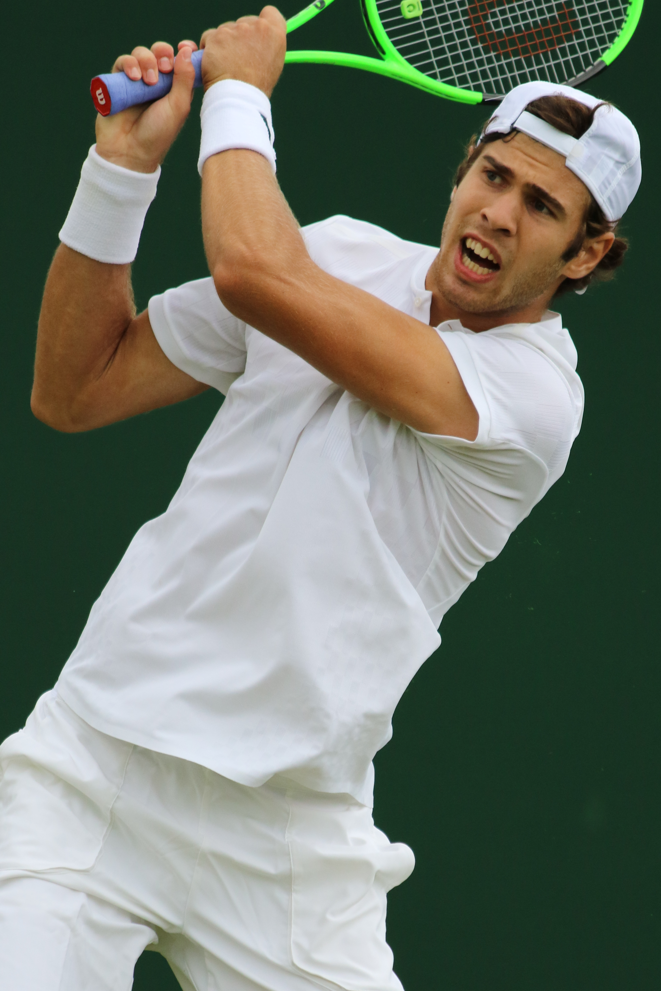 Khachanov WM17 (22)